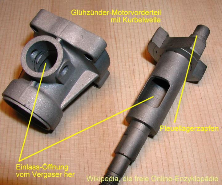 Glühzündermotor